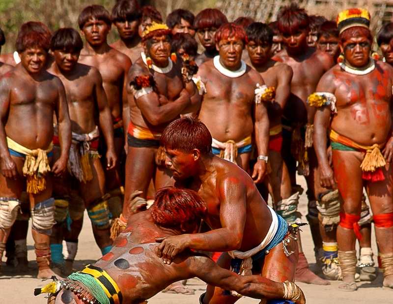 Luta esportiva dos indígenas do parque do xingu